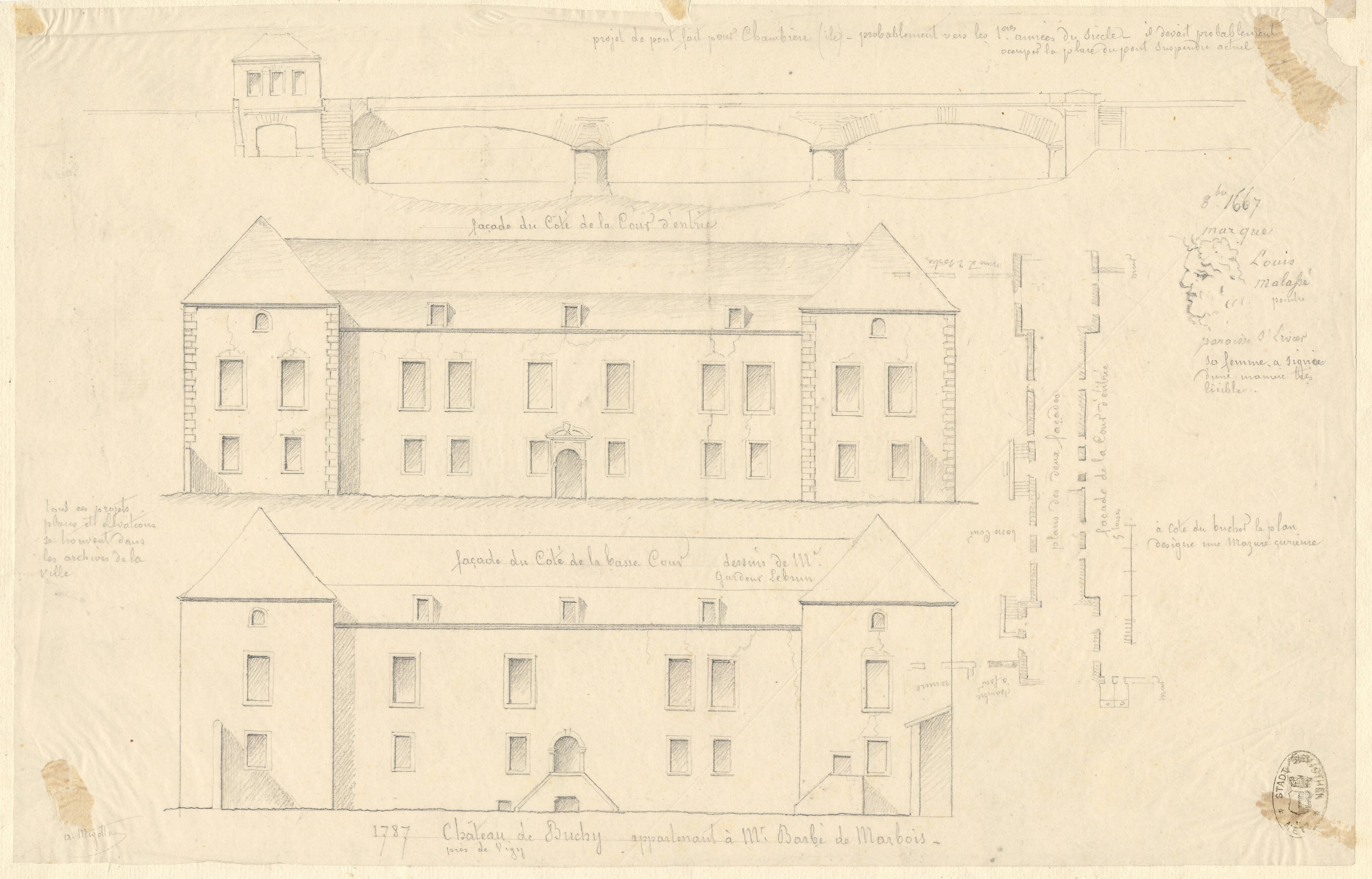 Le dessin comporte la signature d’Auguste Migette.